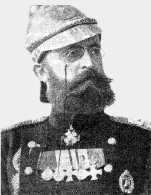 Львов, Александр Дмитриевич